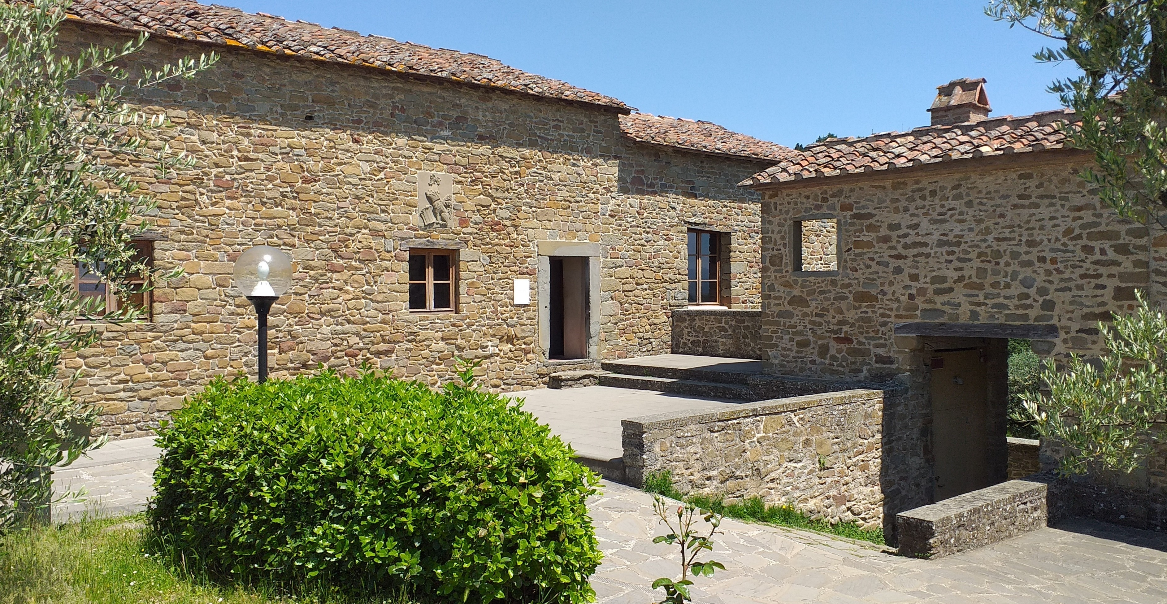 Geburtshaus von Leonardo da Vinci in Vinci (Toskana)